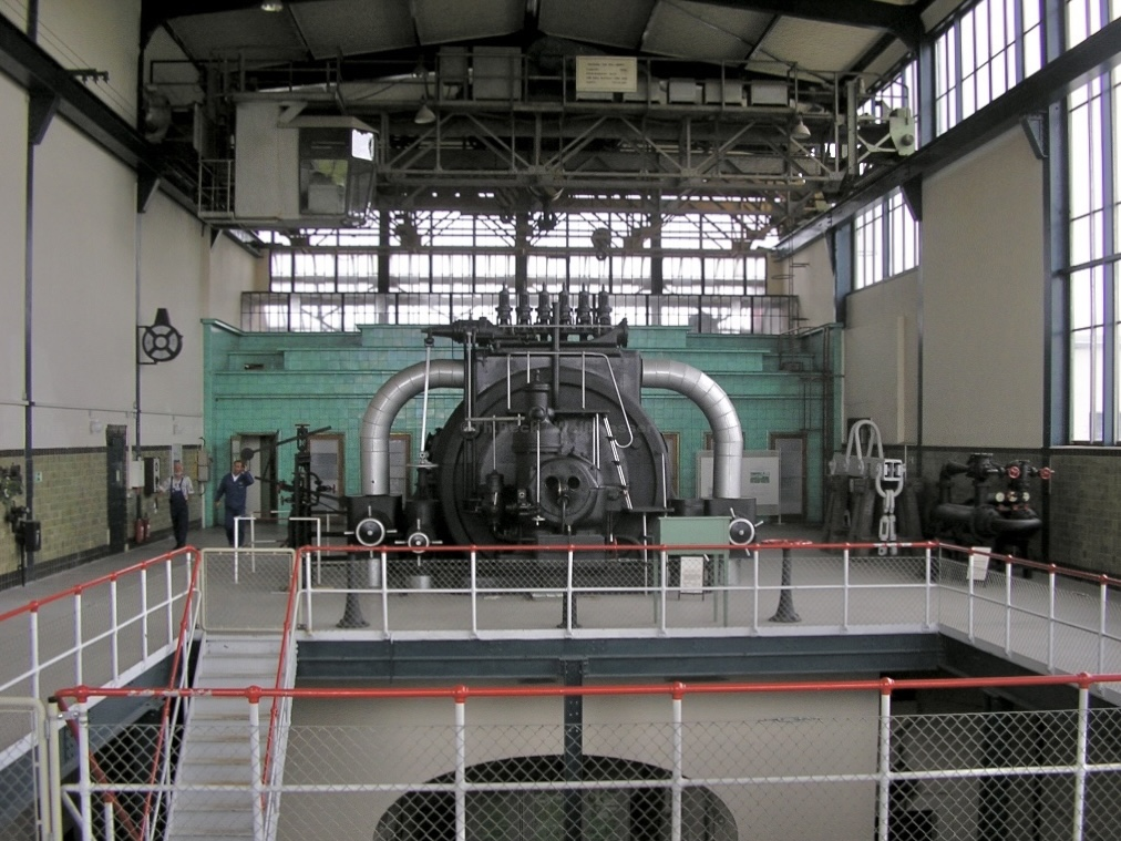 Bilck auf eine Dampfturbine im Maschinenenhaus des Kraftwerkes Zschornewitz.